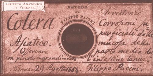 mikroskopischer Objektträger von Pacinimit Vibrio cholerae